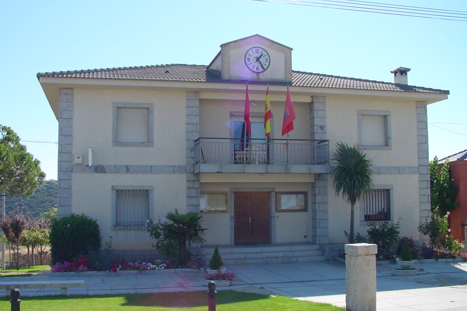 Ayuntamiento Venturada.